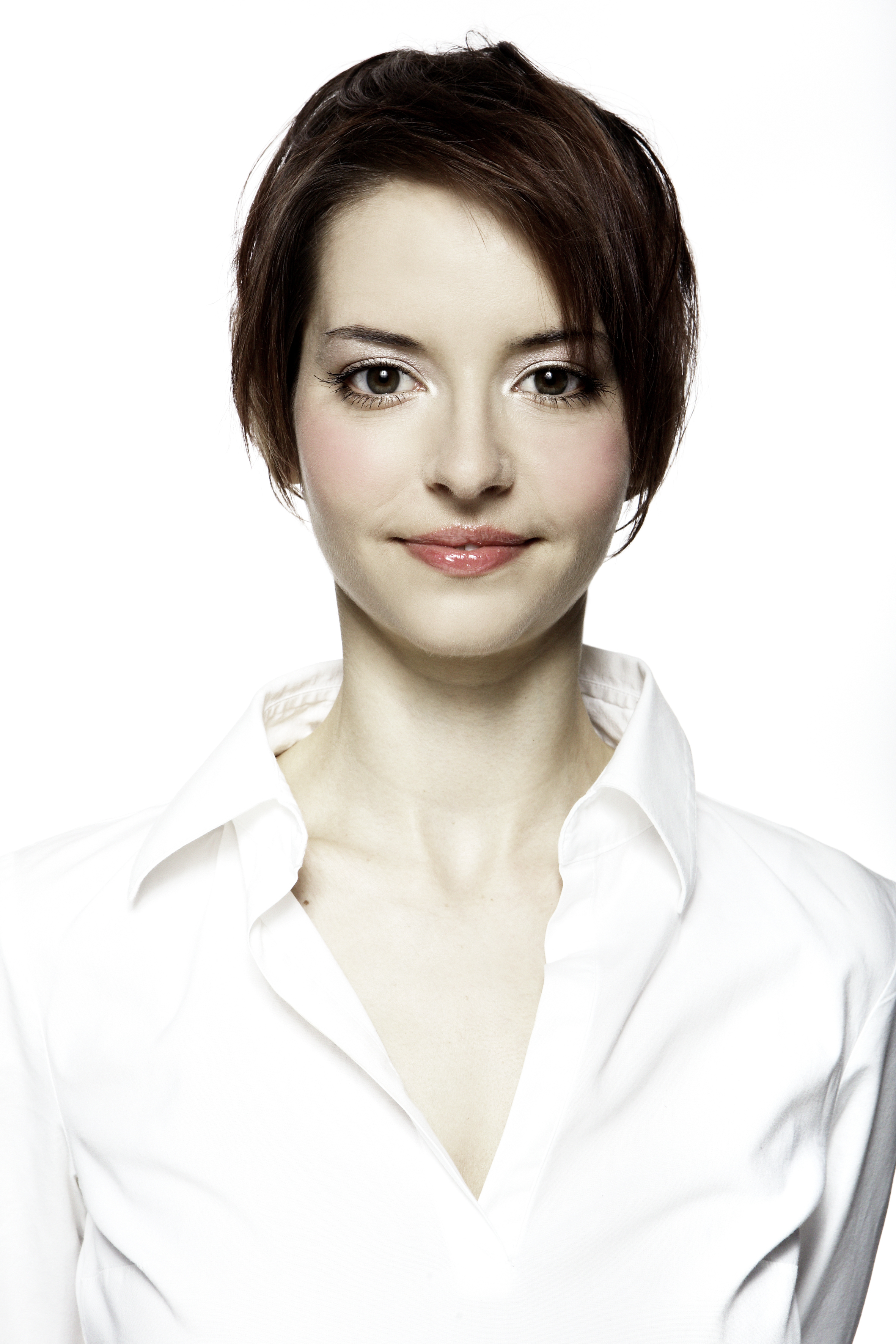 Klára Lidová